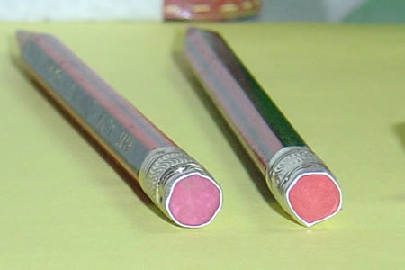 附在鉛筆尾部的橡皮擦。相片由本人拍攝，所有橡皮擦亦由本人擁有